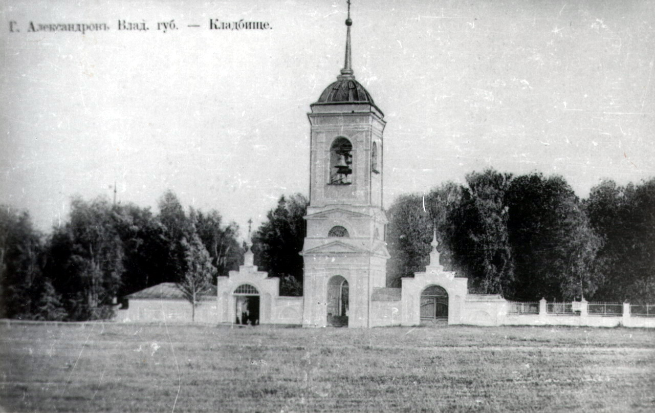 Старинная открытка.